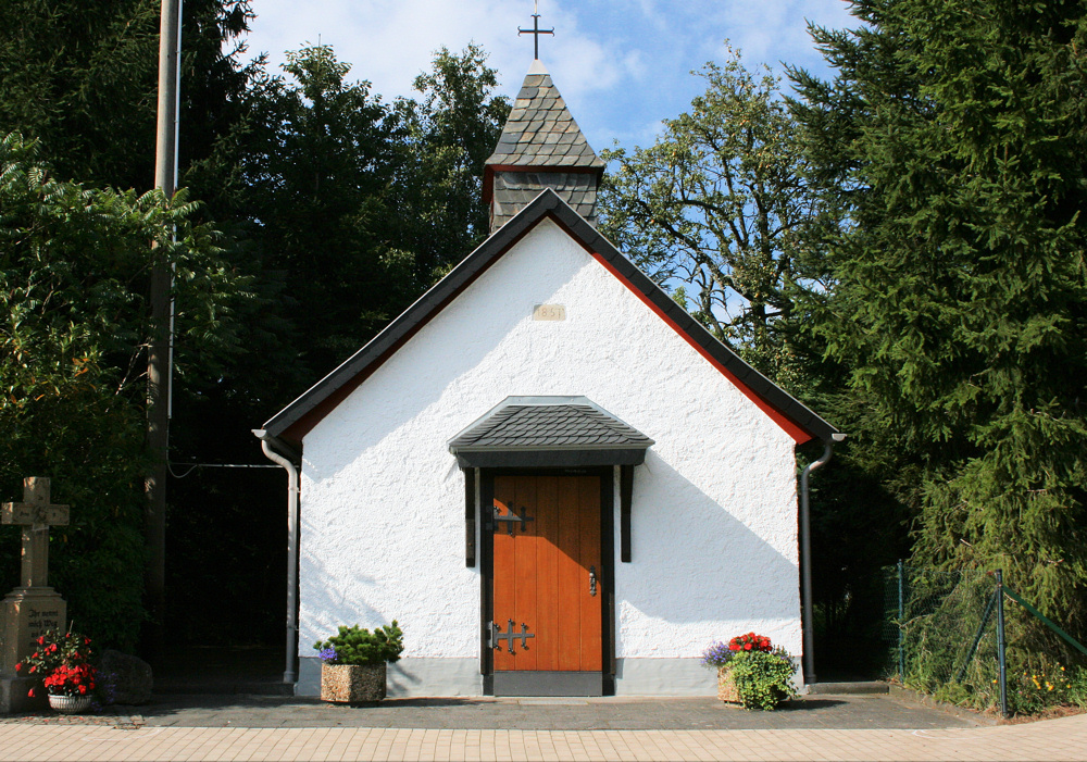 Buchholz (Westerwald), Oberscheider Kapelle